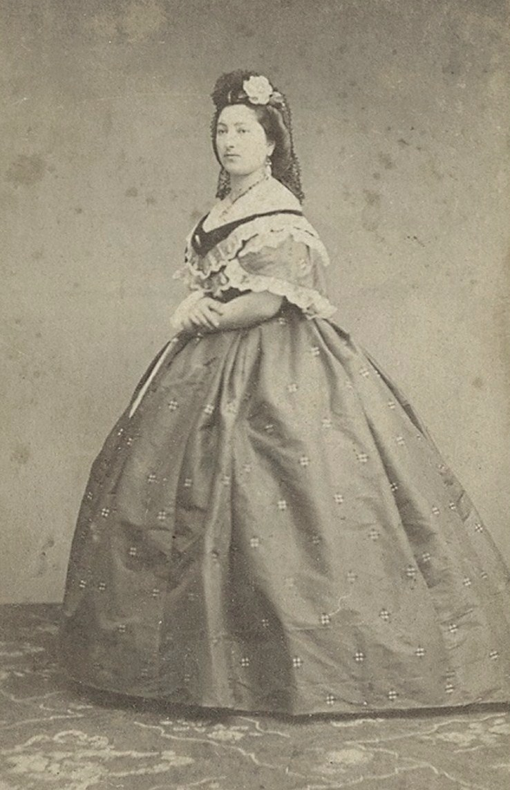 Княгиня Александра Макаровна Меликова, ур. Орбелиани (1836—1914)